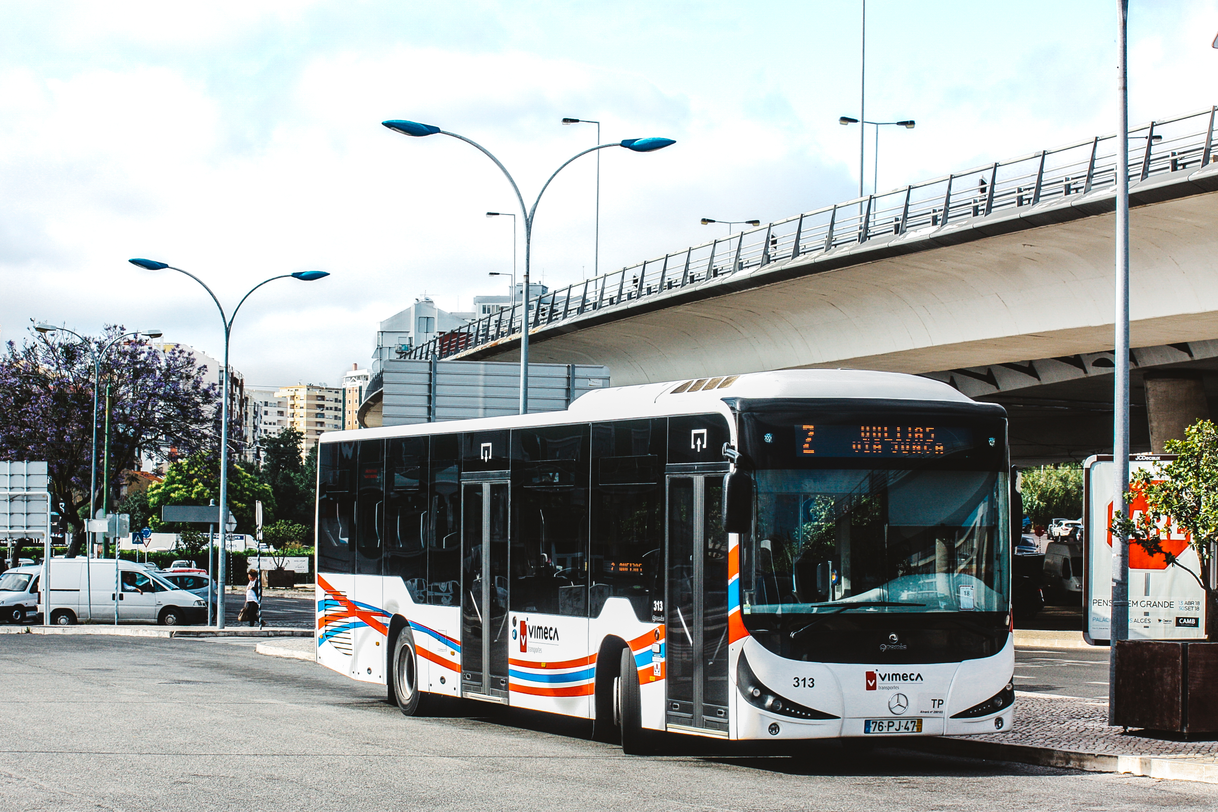 Veículo da Vimeca parqueado no terminal de Algés